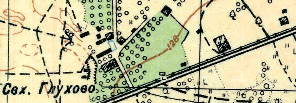 Топографическая карта Ленинградской области, квадрат О-35-24-Б-а (Переярово), деревня Глухово